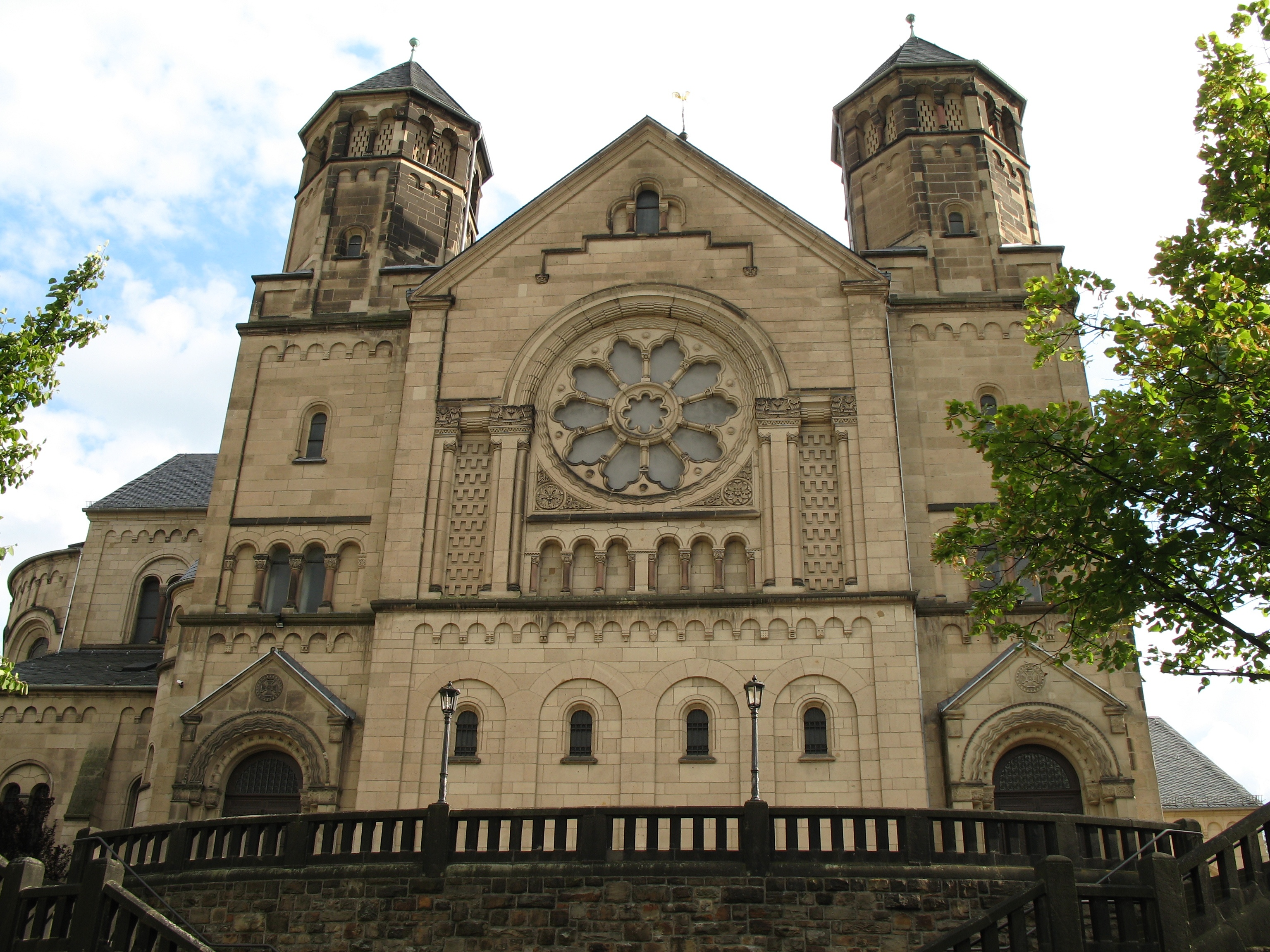 Nordseite der Herz-Jesu-Kirche in Aachen-Burtscheid, Frankenberger Viertel